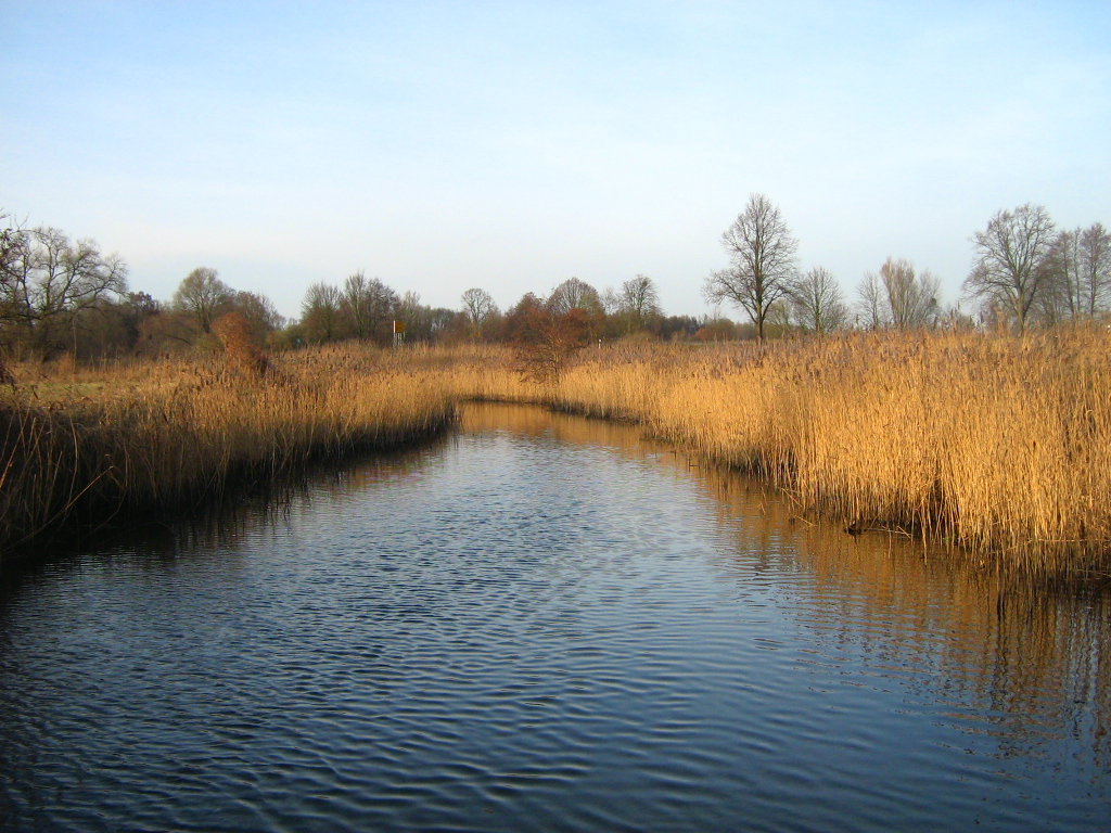 Schnelle Havel bei Liebenwalde (Landkreis Oberhavel, Brandenburg).